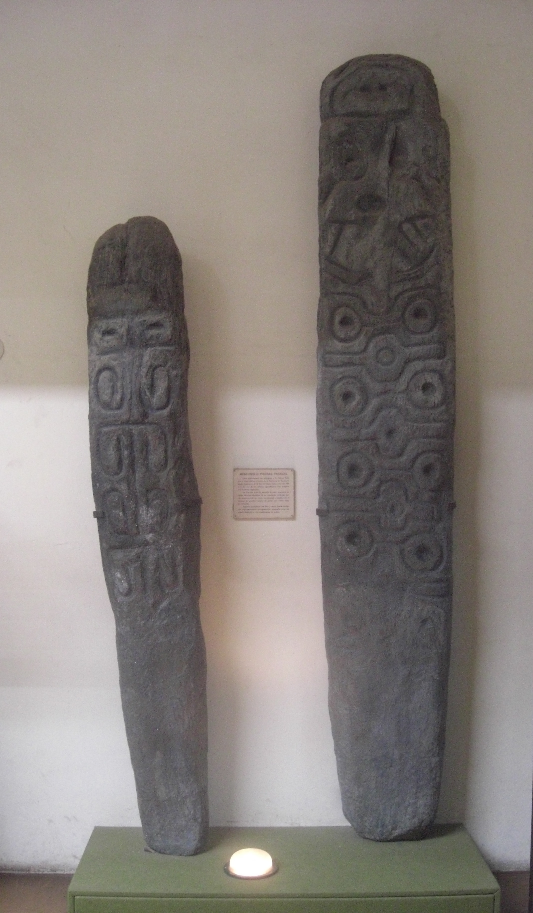 Menhires o Piedras Paradas. Estos especímenes son asignados a la Cultura Tafí, que se desarrolló en el centro de la actual provincia de Tucumán (Argentina)desde comienzos de la era Cristiana hasta cerca del año 600 una de las culturas agroalfareras más antiguas del noroesta argentino.En Tafí del Valle, la mayoría de estos monolitos estaban situados alrededor de un montículo artificial, quizas constituyendo un centro ceremonial.Algunos ejemplares son lisos y otros tienen esculpidas representaciones antropomorfas , zoomorfas o ambas.(Museo de la Plata. Argentina)